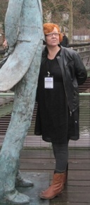 Kristiina Kolehmainen